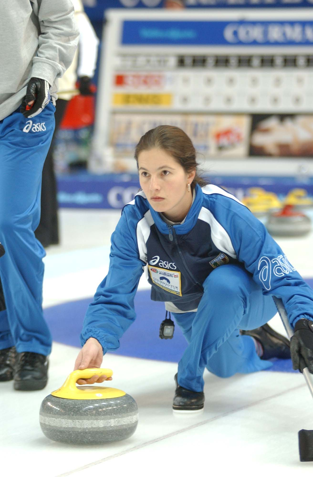 Violetta_Caldart at the 2003 European Curling Championships (December 2003) in Courmayeur, Italy.